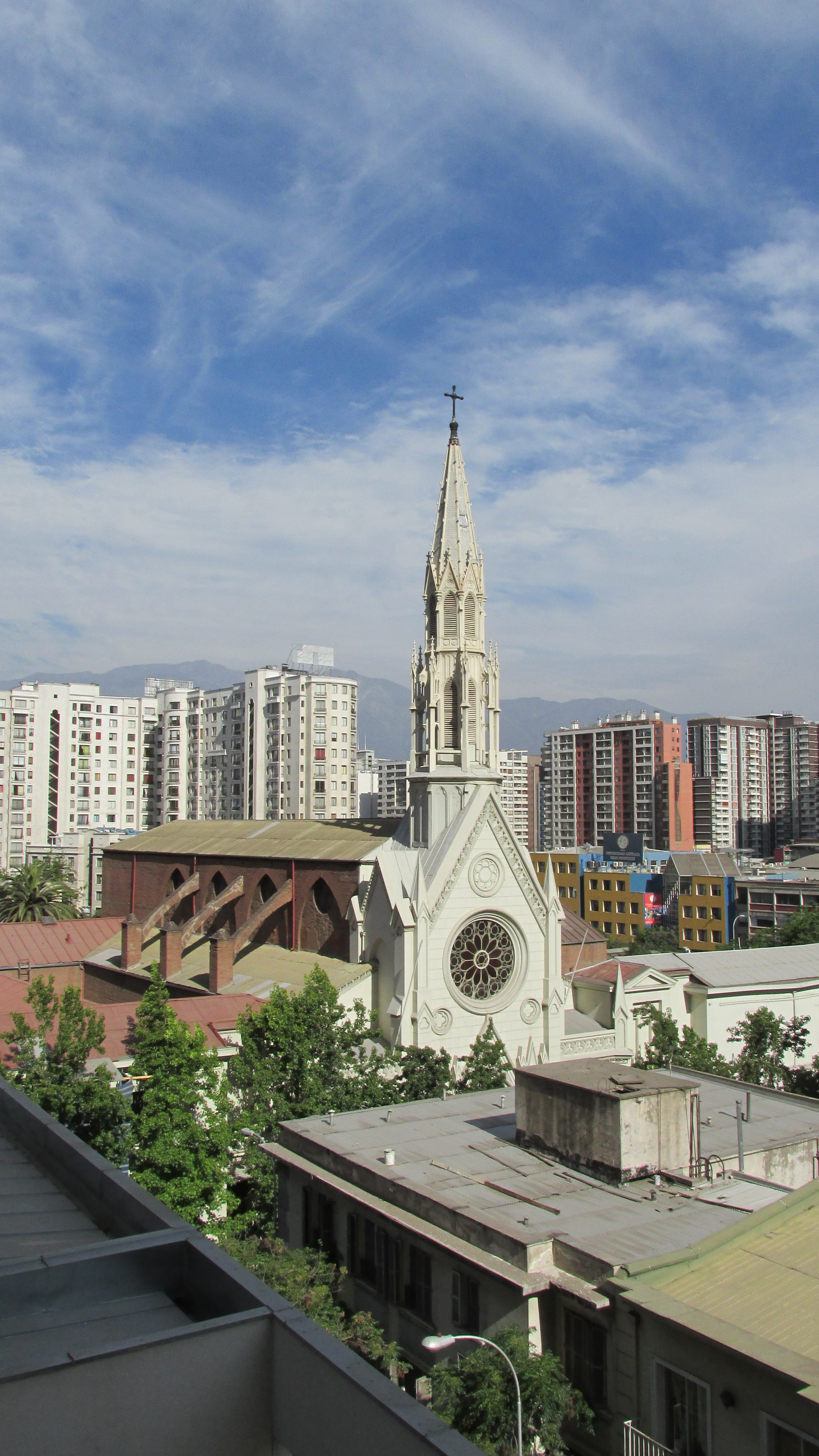 Frontis Iglesia Dulce Nombre de Maria